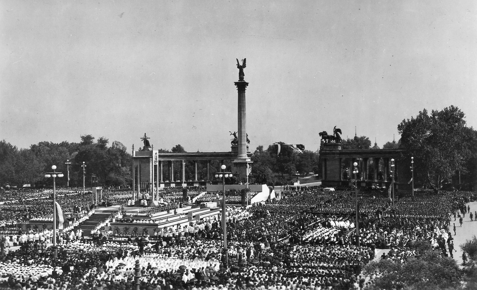 Hősök tere, XXVIII. Katolikus Nagygyűlés oltára. Location: Hungary, Budapest XIV. Tags: sculpture, religion, church, altar, meeting, mass, flag, Budapest Title: Hősök tere, XXVIII. Katolikus Nagygyűlés oltára.